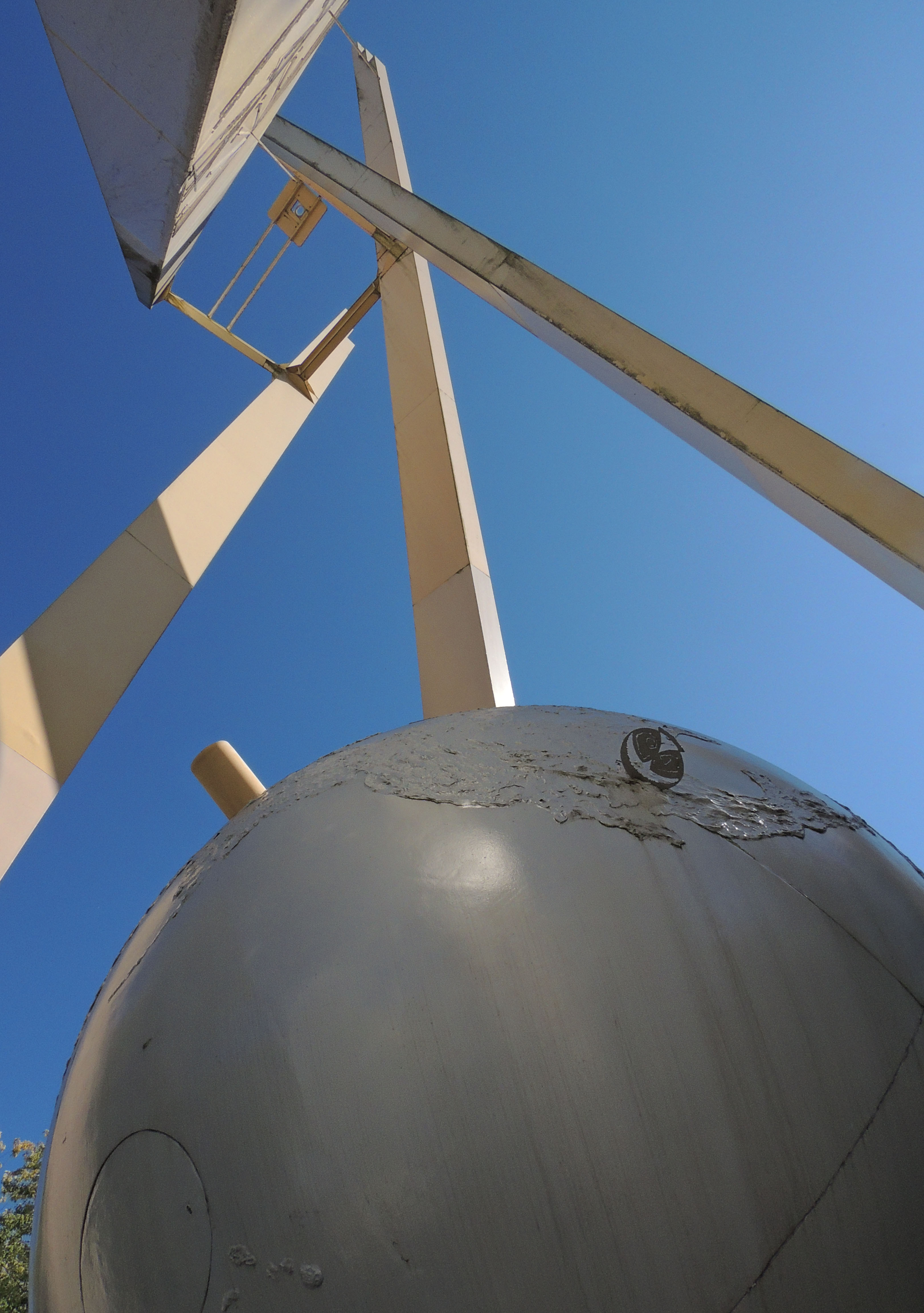 Sphère appartenant au vaisseau archipel du parc Prés-La-Rose de Montbéliard.